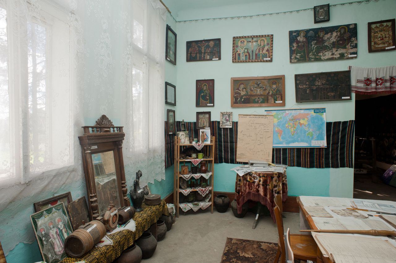 фото в музее 2